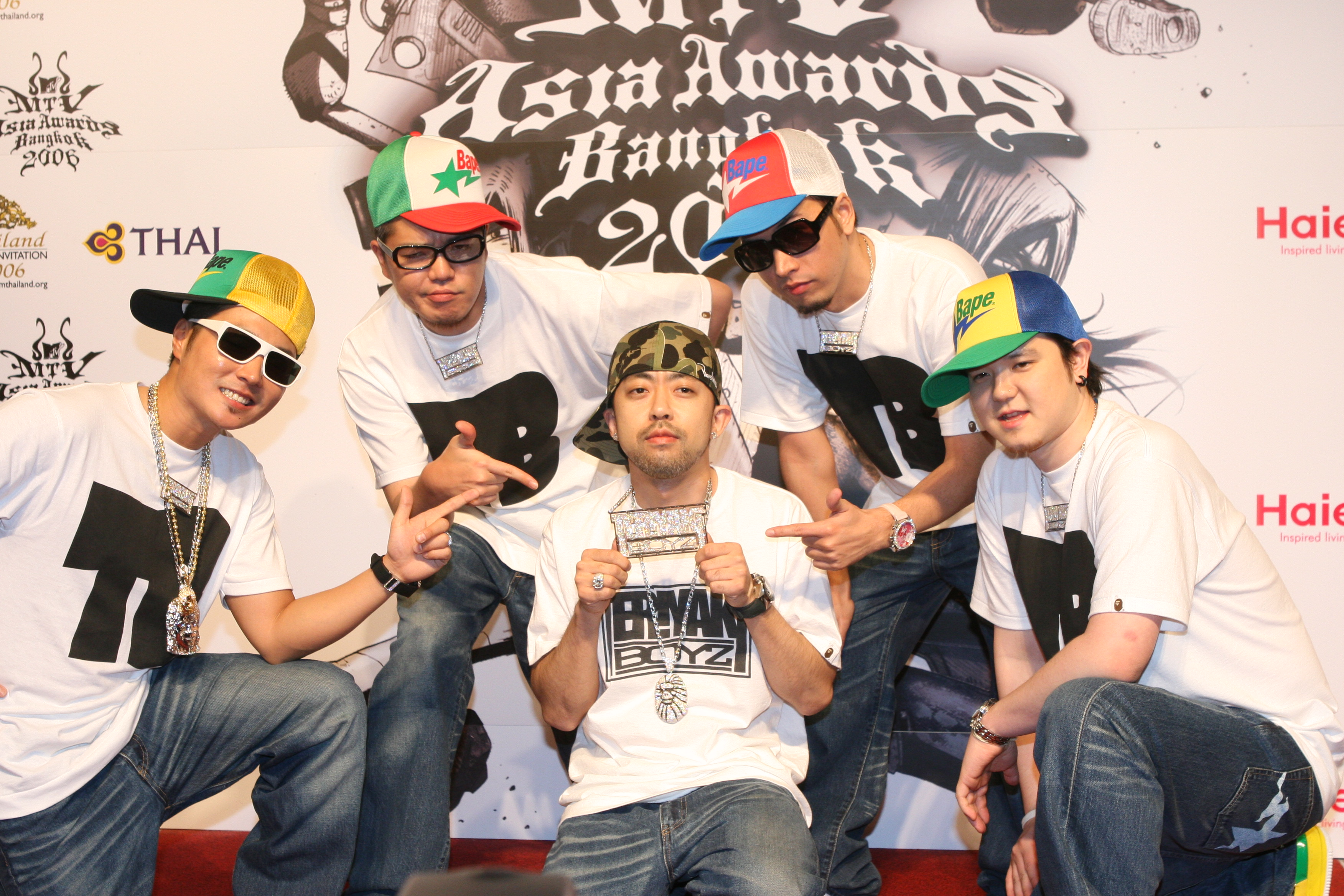 Teriyaki Boyz (Hip Hop band from japan) at Bangkok, Thailand